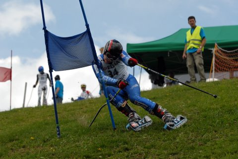 Auf diesem Foto ist Marco Schürch am FIS-Rennen auf der Marbachegg erkennbar.